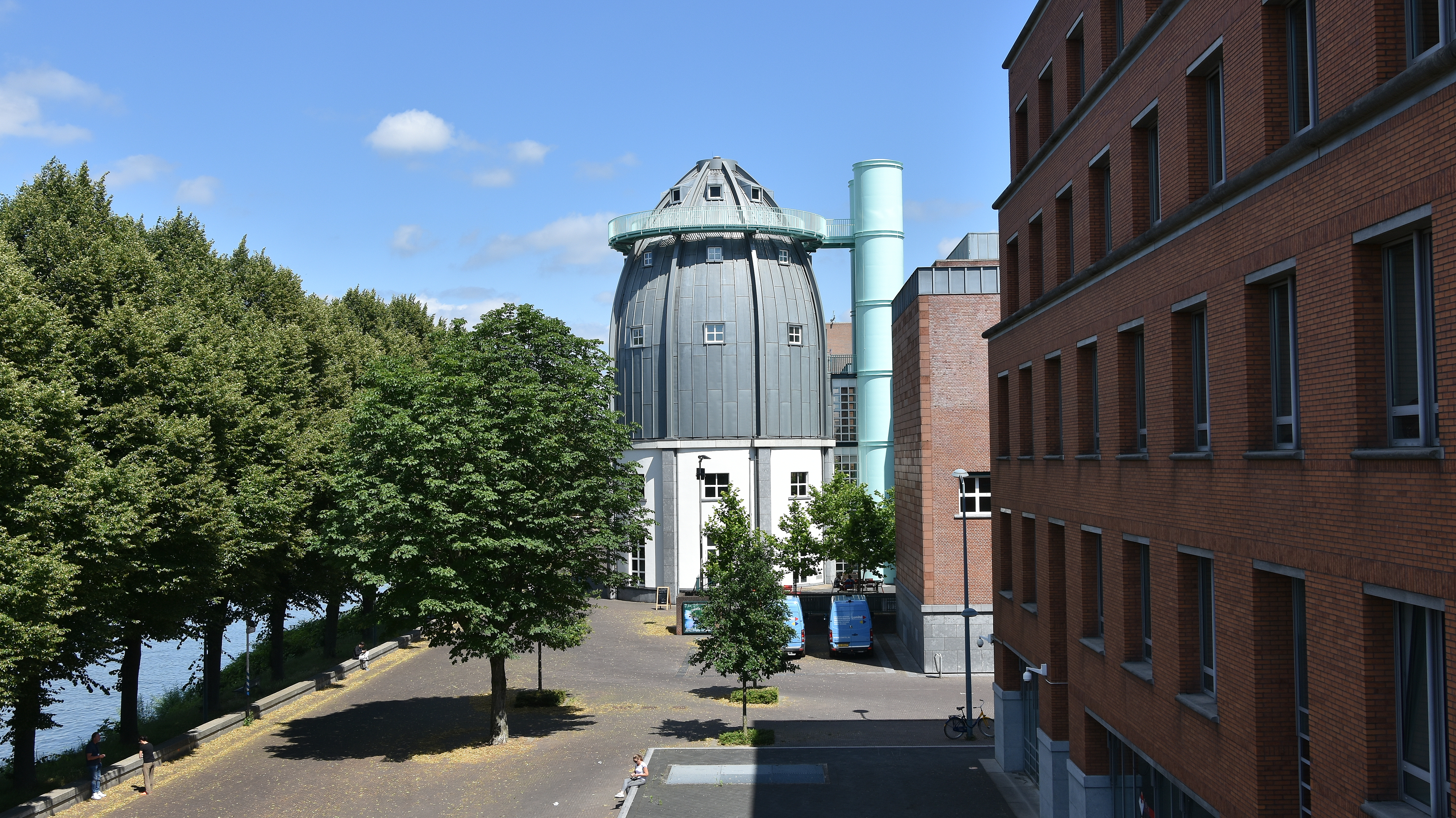 Rakettoren - Bonnefantenmuseum (Maastricht) 20-06-2018